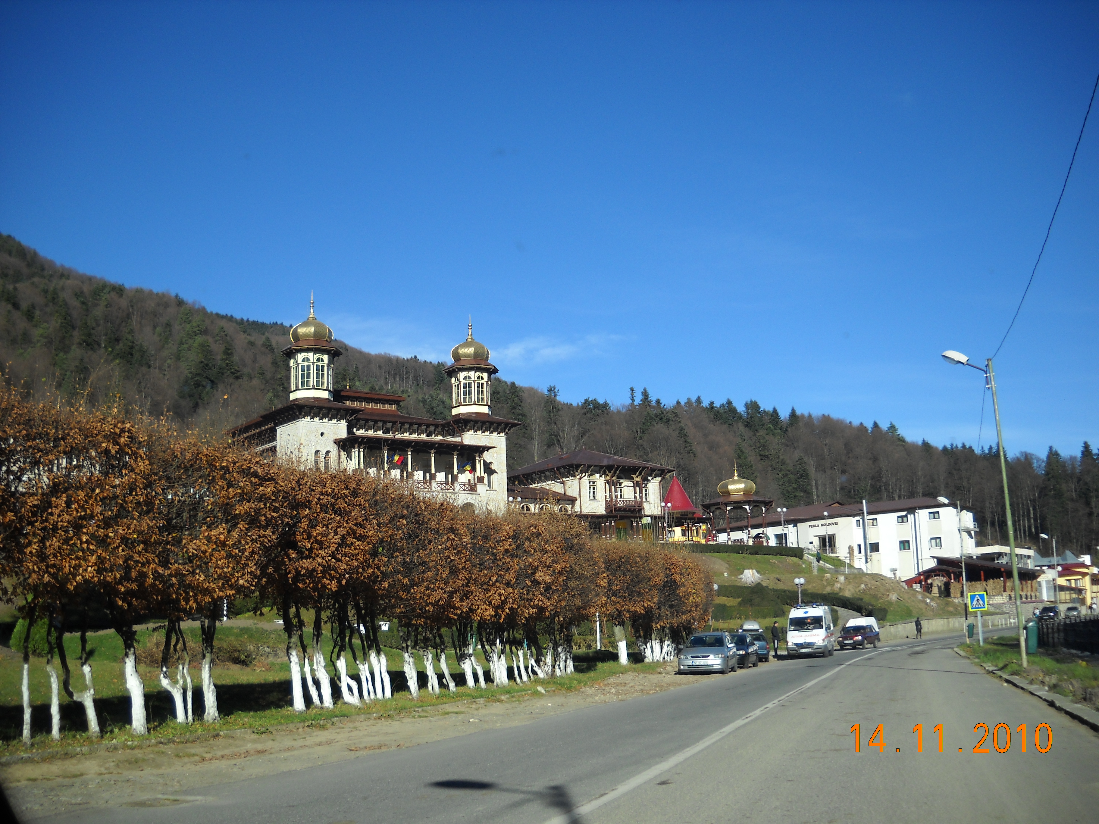 Slanic Moldova, Cazino si parc.